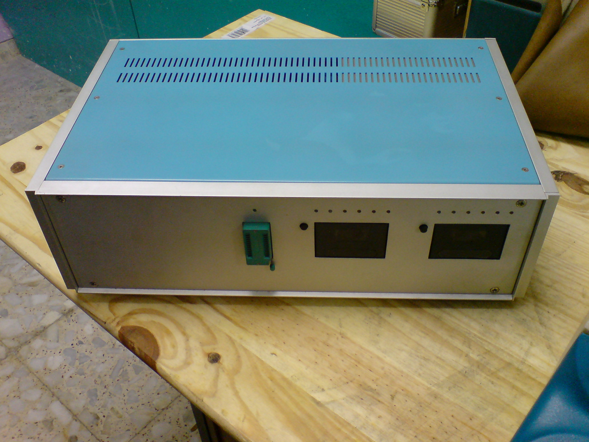 Prototipo de Comelta Drac-1, basado en Rockwell AIM-65 caja de ampliación